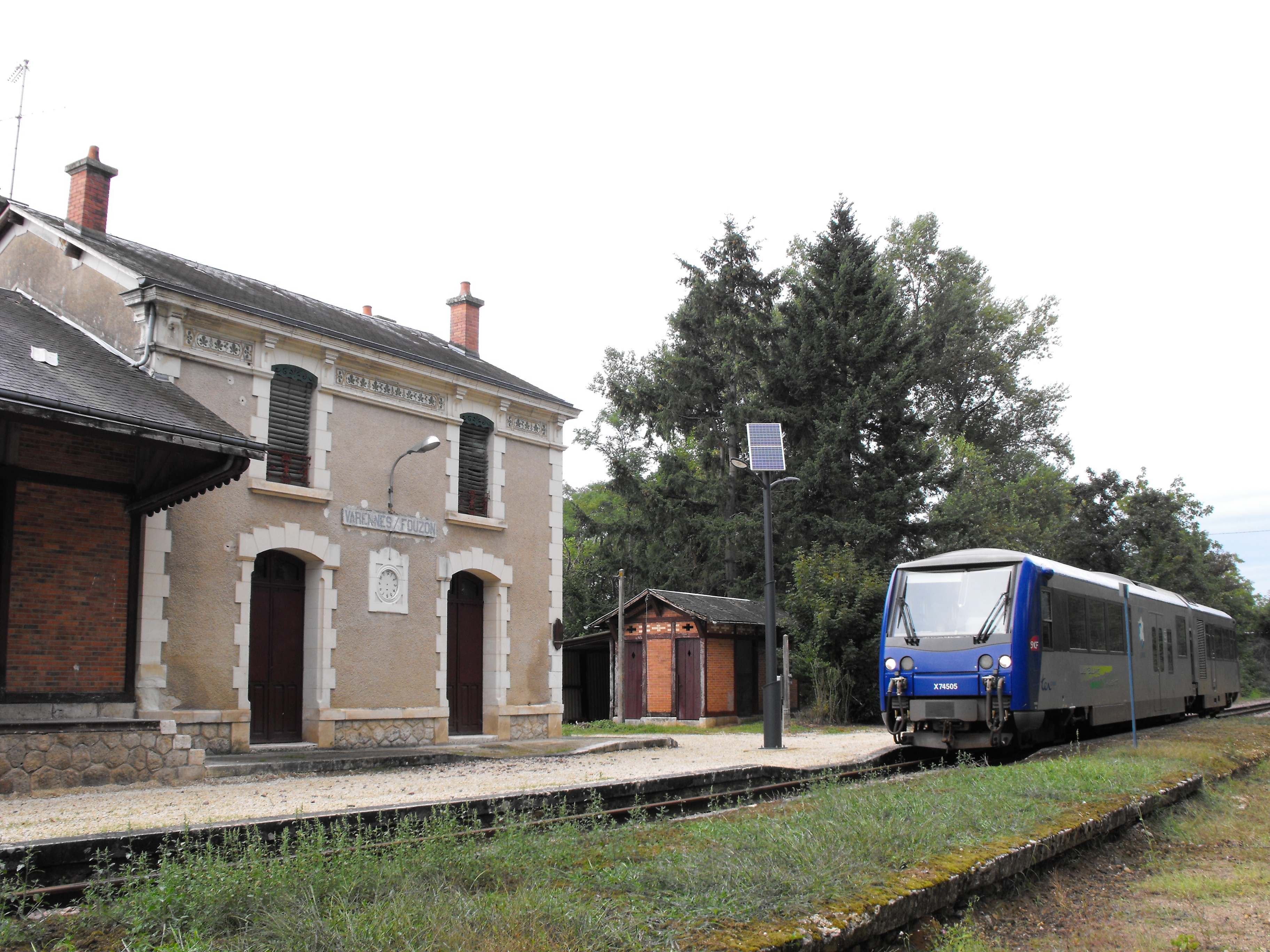 Varenne-sur-Fouzon, Indre (France), Autorail, TER Centre, X 74505, août 2014